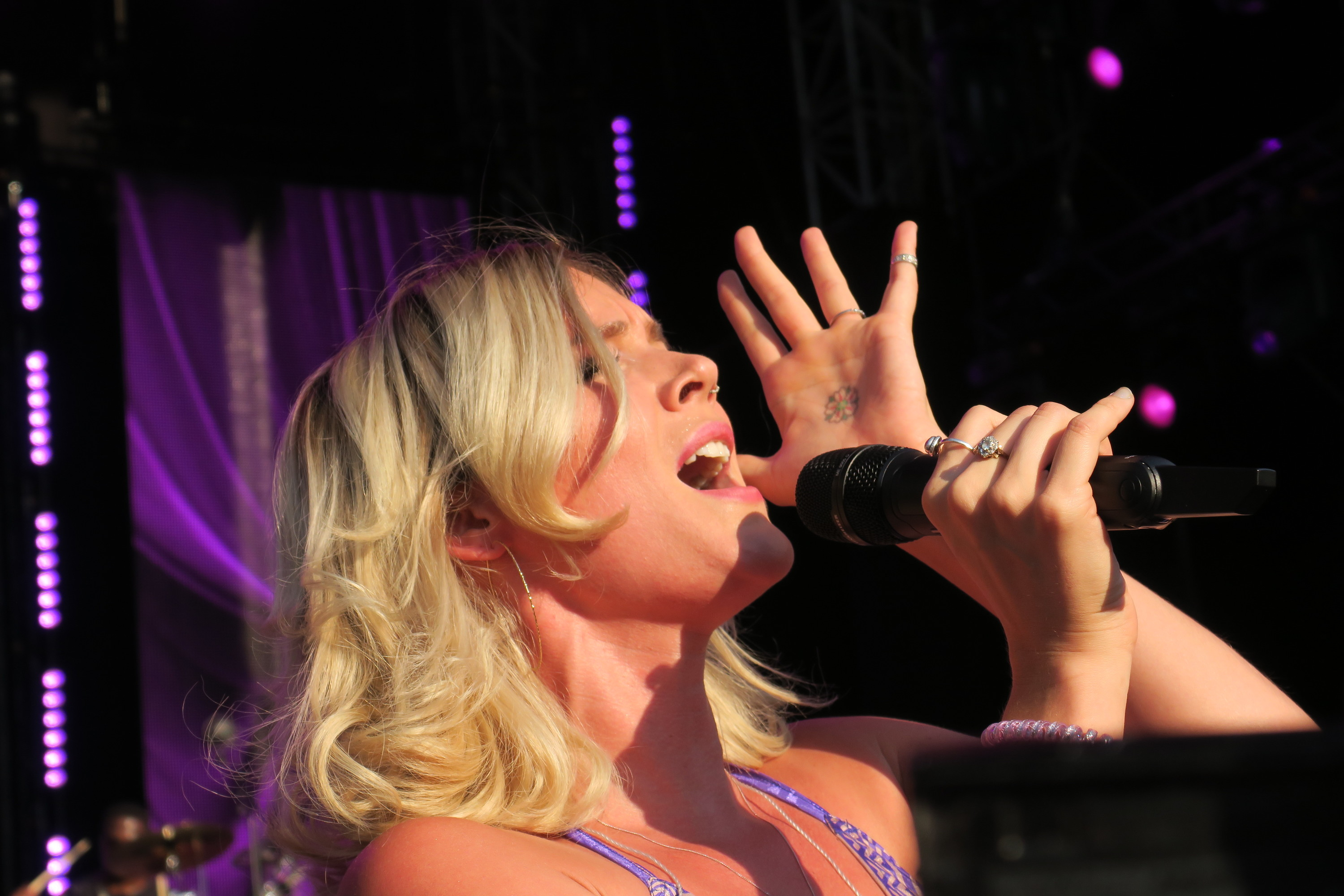 Joss Stone, 2018-07-19, jazzopen 2018, Schlossplatz Stuttgart